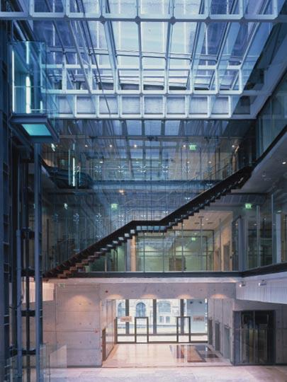 Centrum Gieˆłdowe w Warszawie